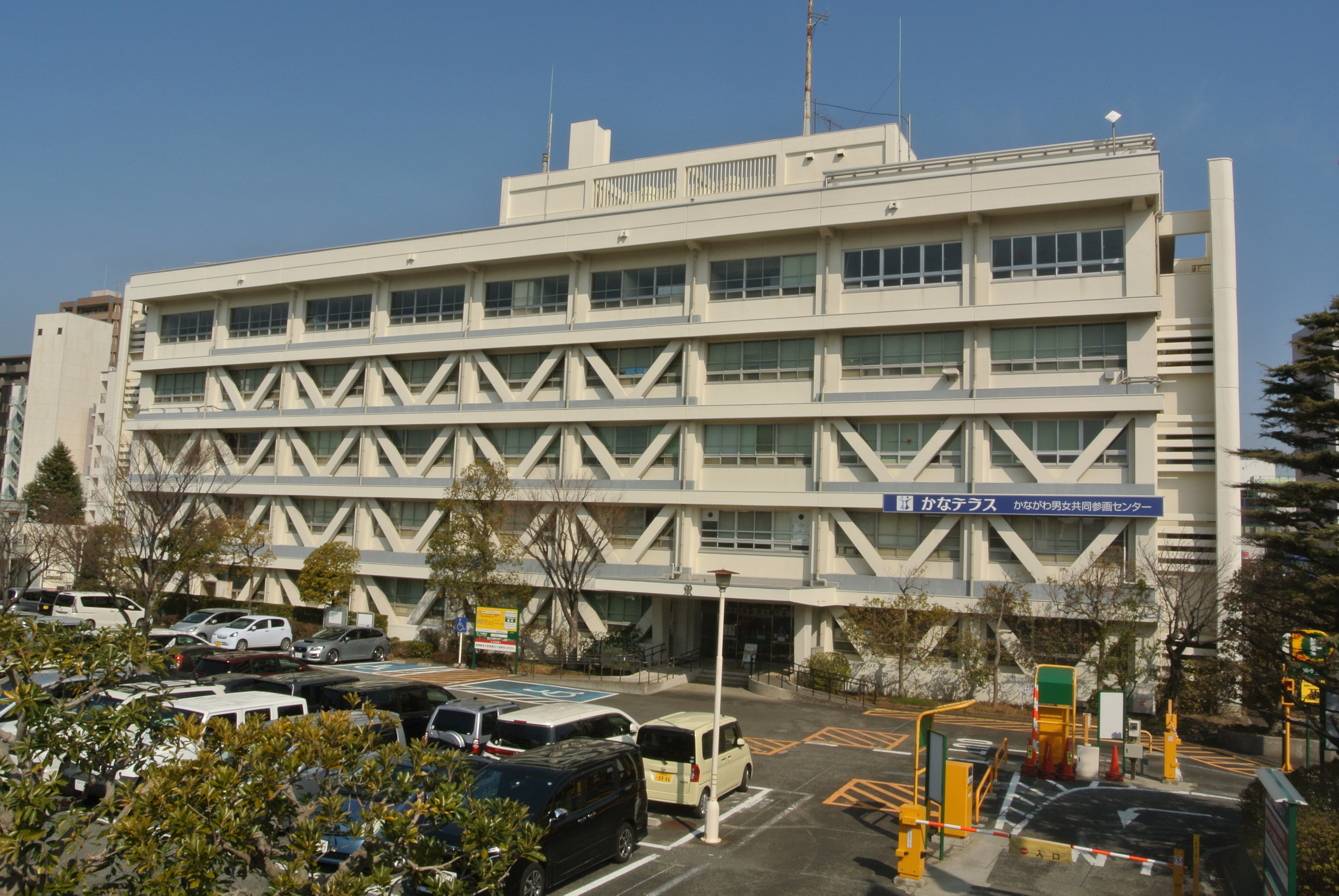 かながわ男女共同参画センター（かなテラス）が入る神奈川県藤沢合同庁舎の全景（南側）